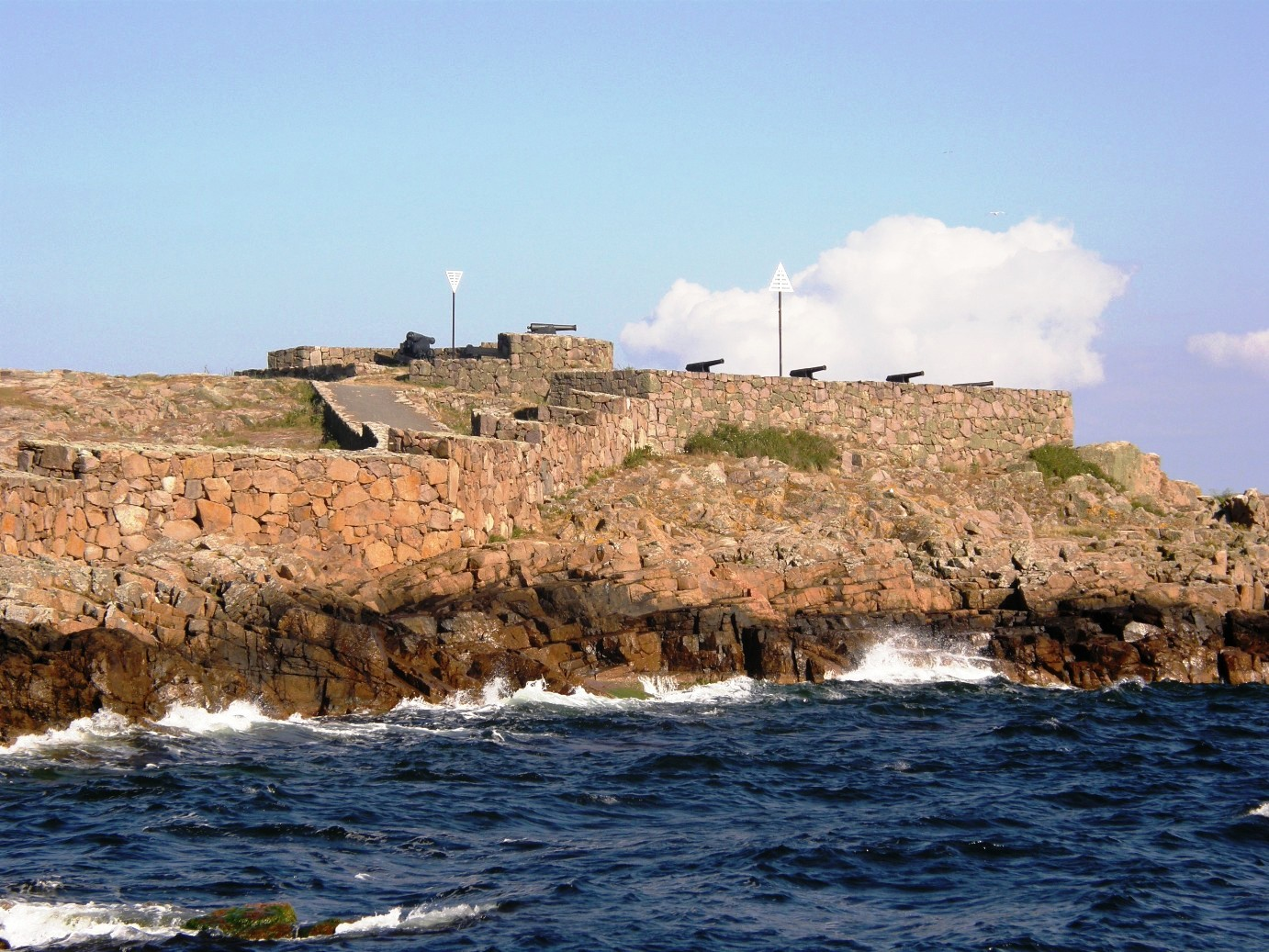 Bastion Królewski - widok z falochronu na Frederikso